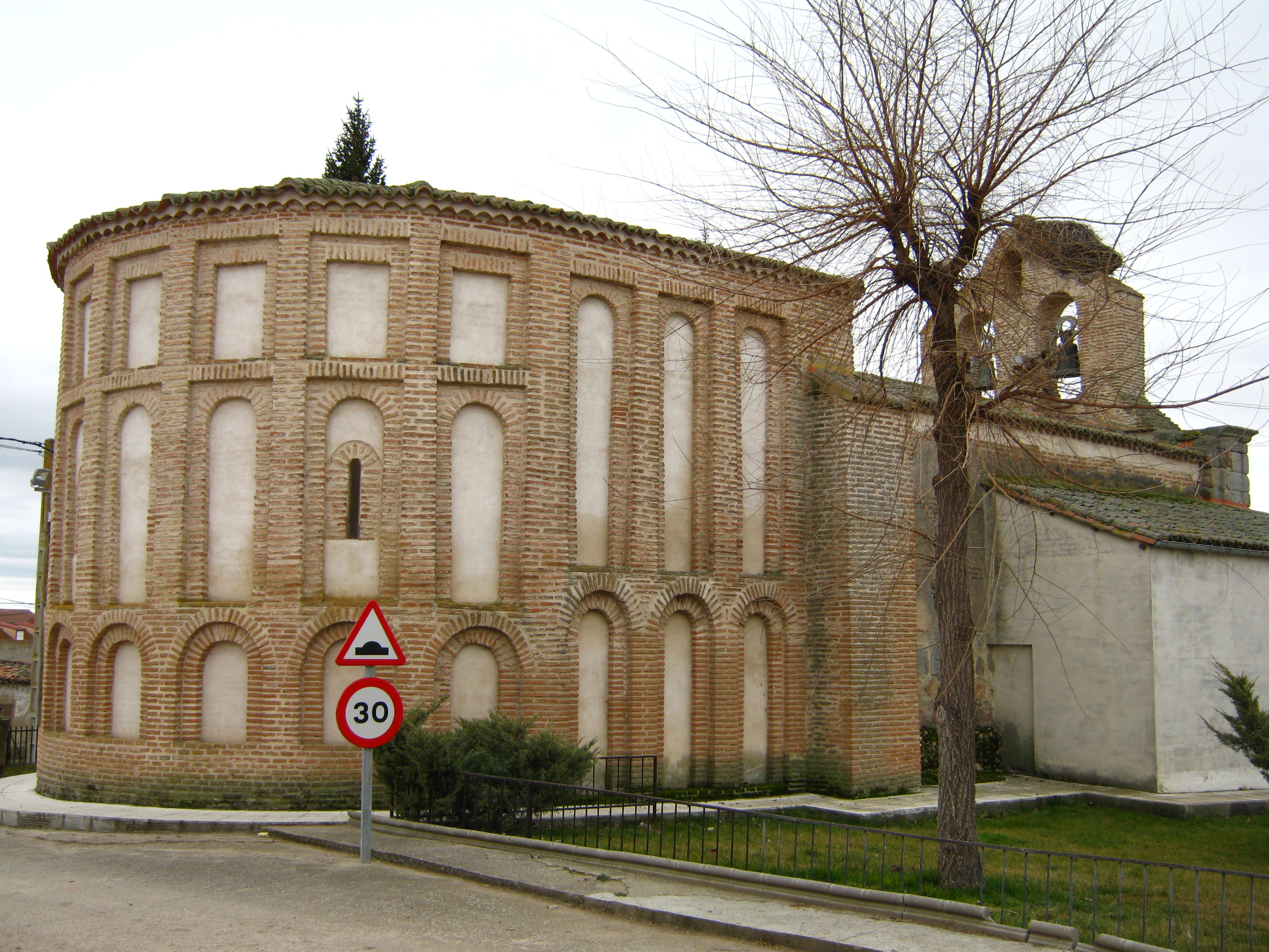 Iglesia parroquial de Coca de Alba (Salamanca, Reino de León)